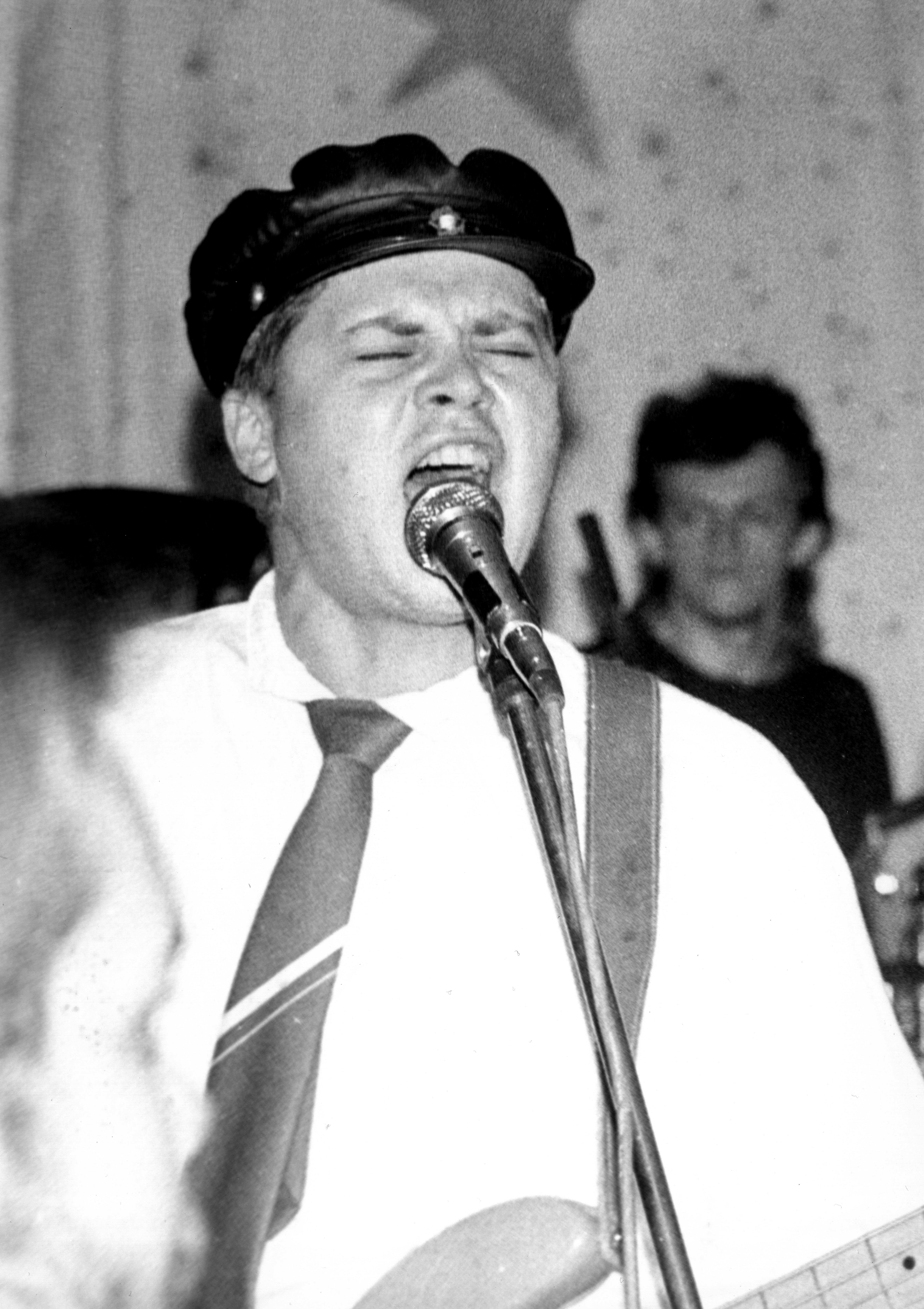 Podczas koncertu zespołu Big Cyc w Klubie Studenckim OLIMP na Osiedlu Lumumbowo. Rok 1988. Z tyłu perkusista Jarosław Lis (Dżery)